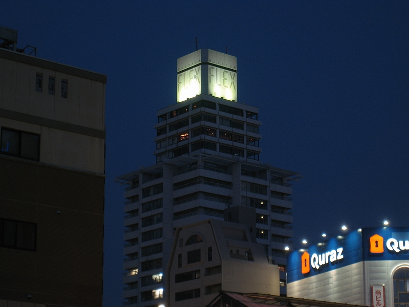 夜の雲竜フレックスビル（FL-Wフィルター使用）